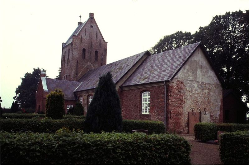 Klixbüll Kirke i Sydslesvig. Klixbüll kirke